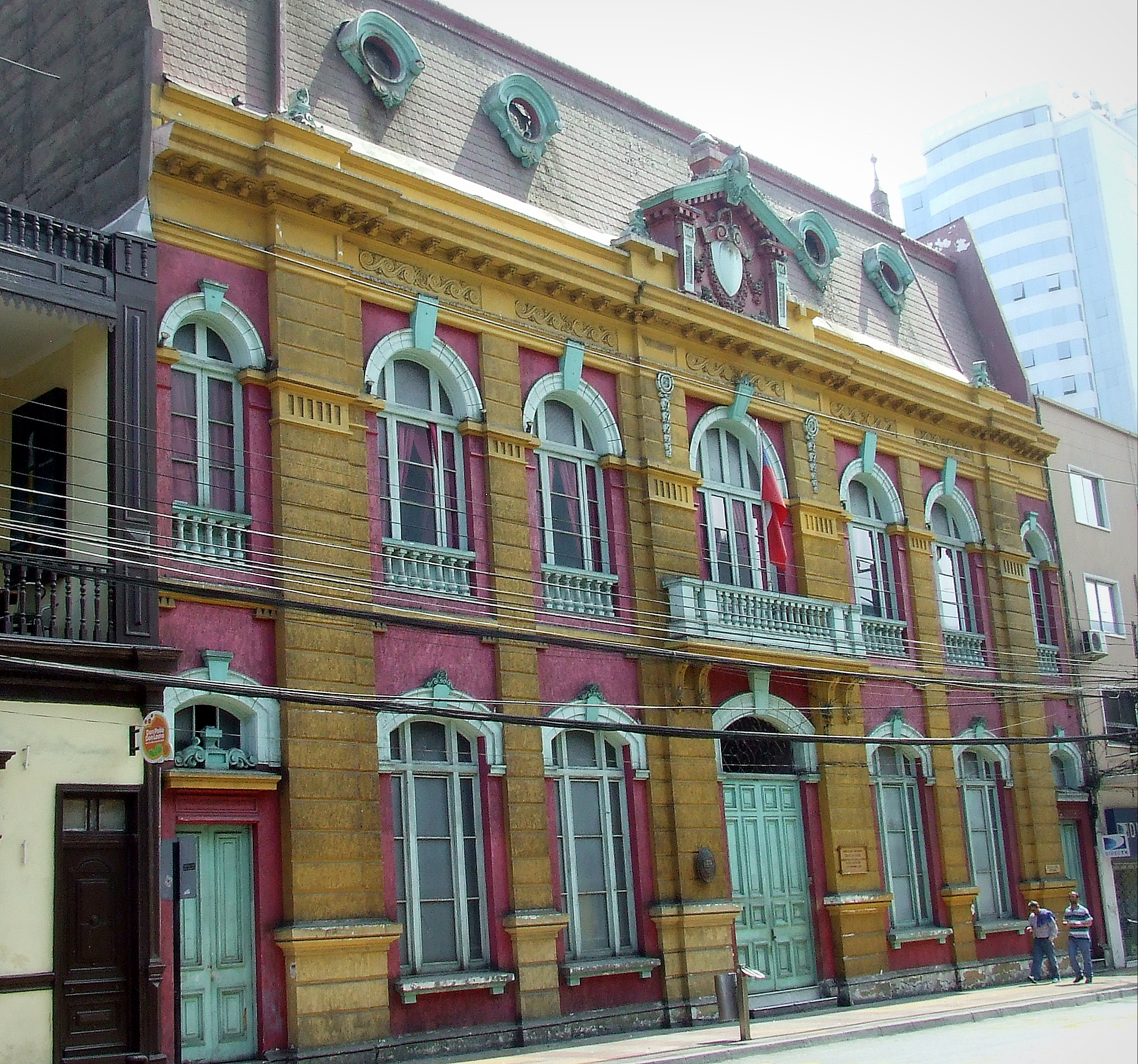 Edificio de la Ilustre Municipalidad de Antofagasta This is a photo of a national monument in Chile: 728